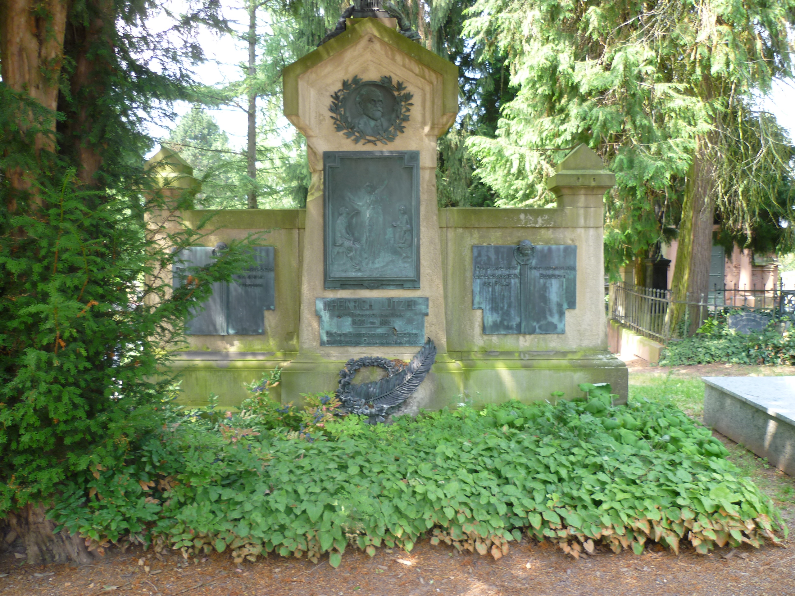 Grabstätte von Jakob Heinrich Lützel auf dem Zweibrücker Hauptfriedhof